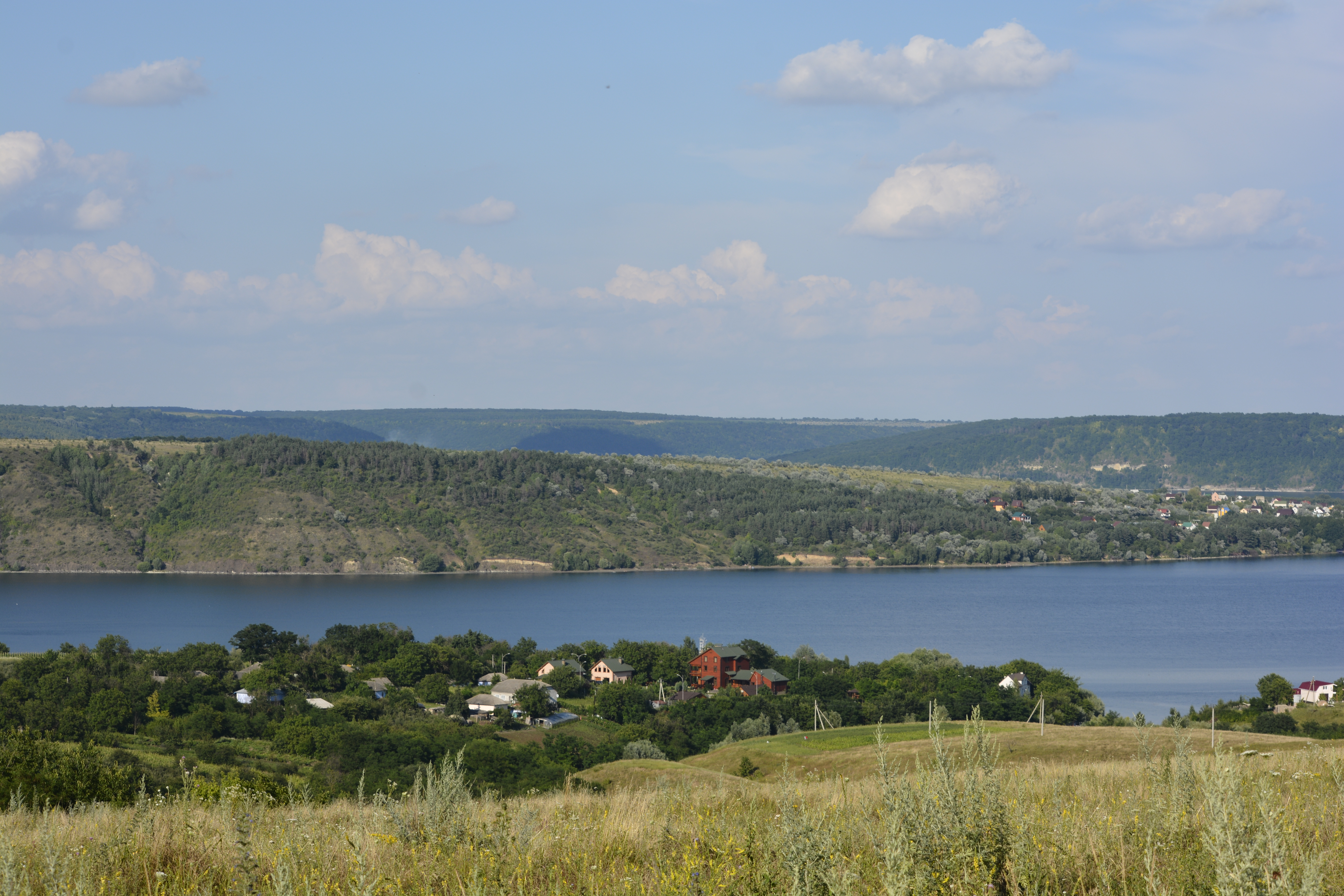 Сокирянський район, с. Непоротове. Дністровсько-Прутське басейнове управління водних ресурсів 9,0, Заказник Іхтіологічні.